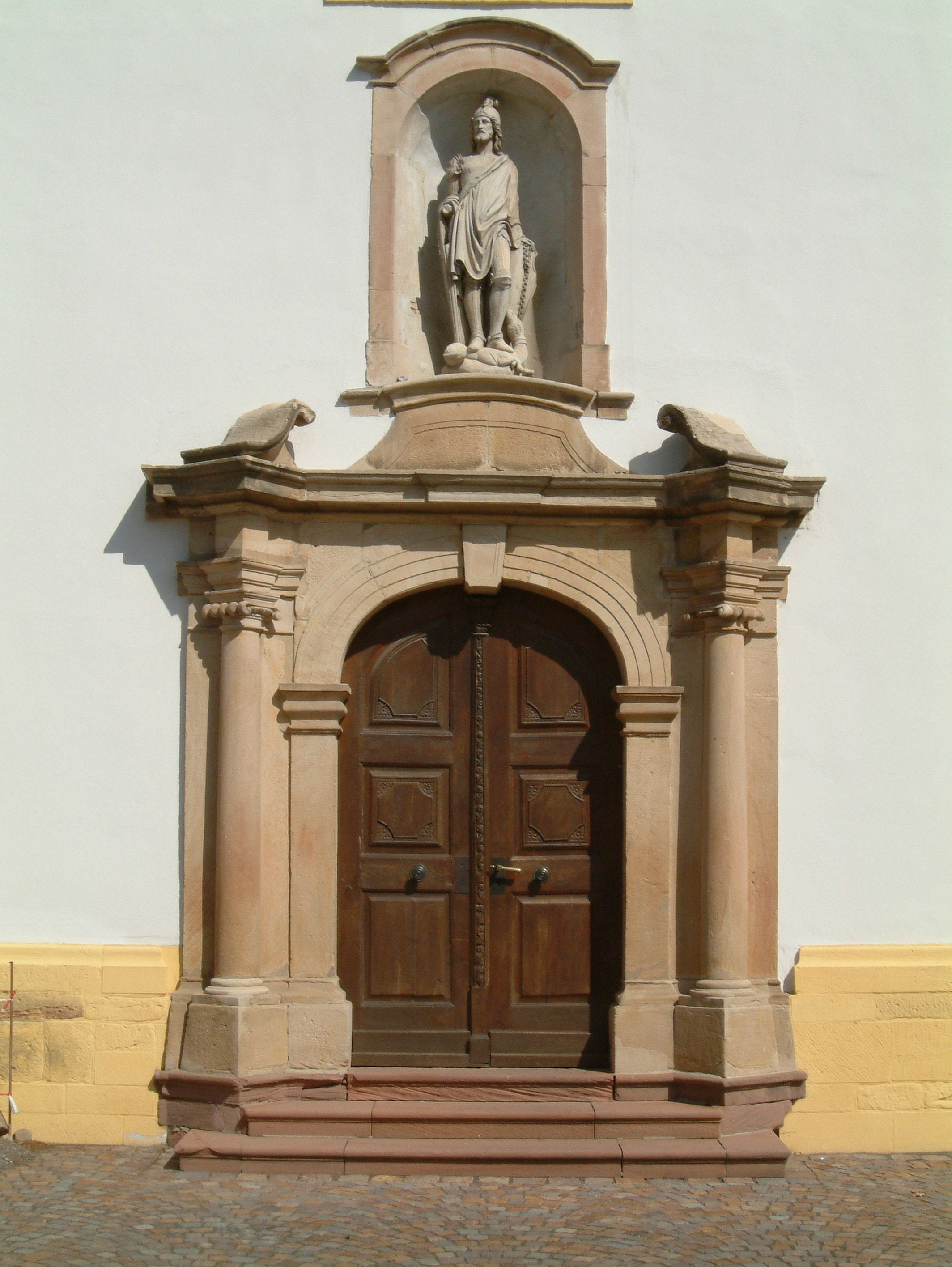 Laurentiuskirche (Südportal) zu Dirmstein, selbst fotografiert am 28.04.2006 und freigegeben durch Benutzer:Mundartpoet